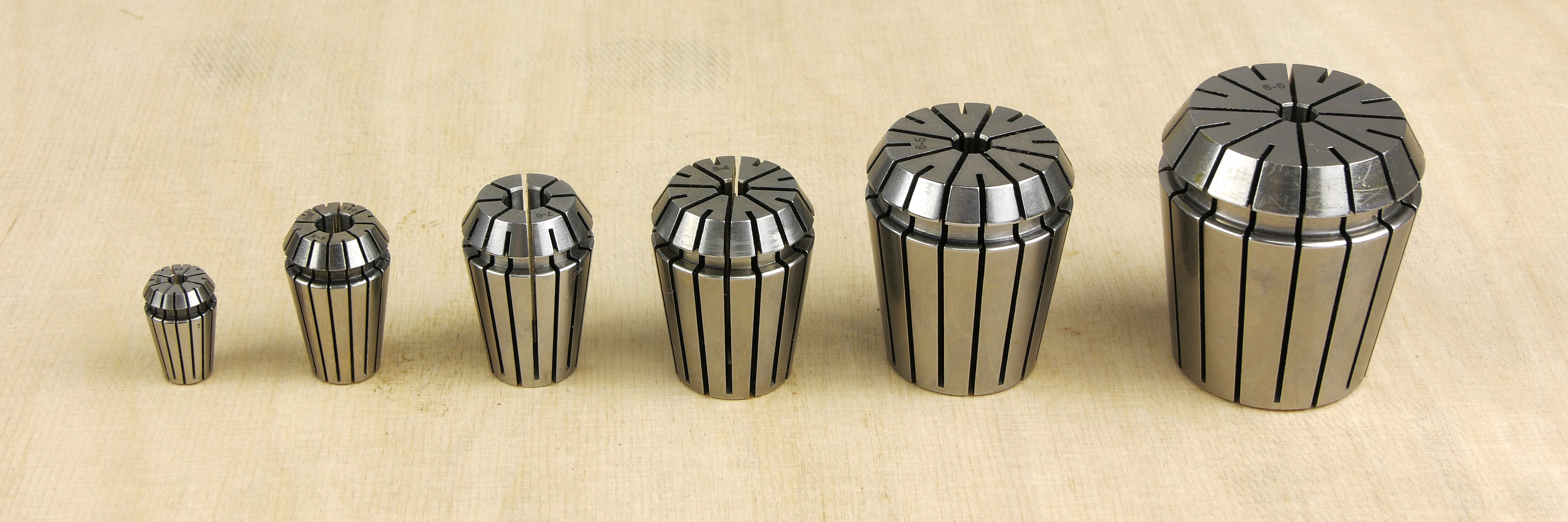 Tulejki zaciskowe typu ER są powszechnie stosowanym typem tulejek do mocowania narzędzi skrawających. Mogą również mocować przedmioty obrabiane.